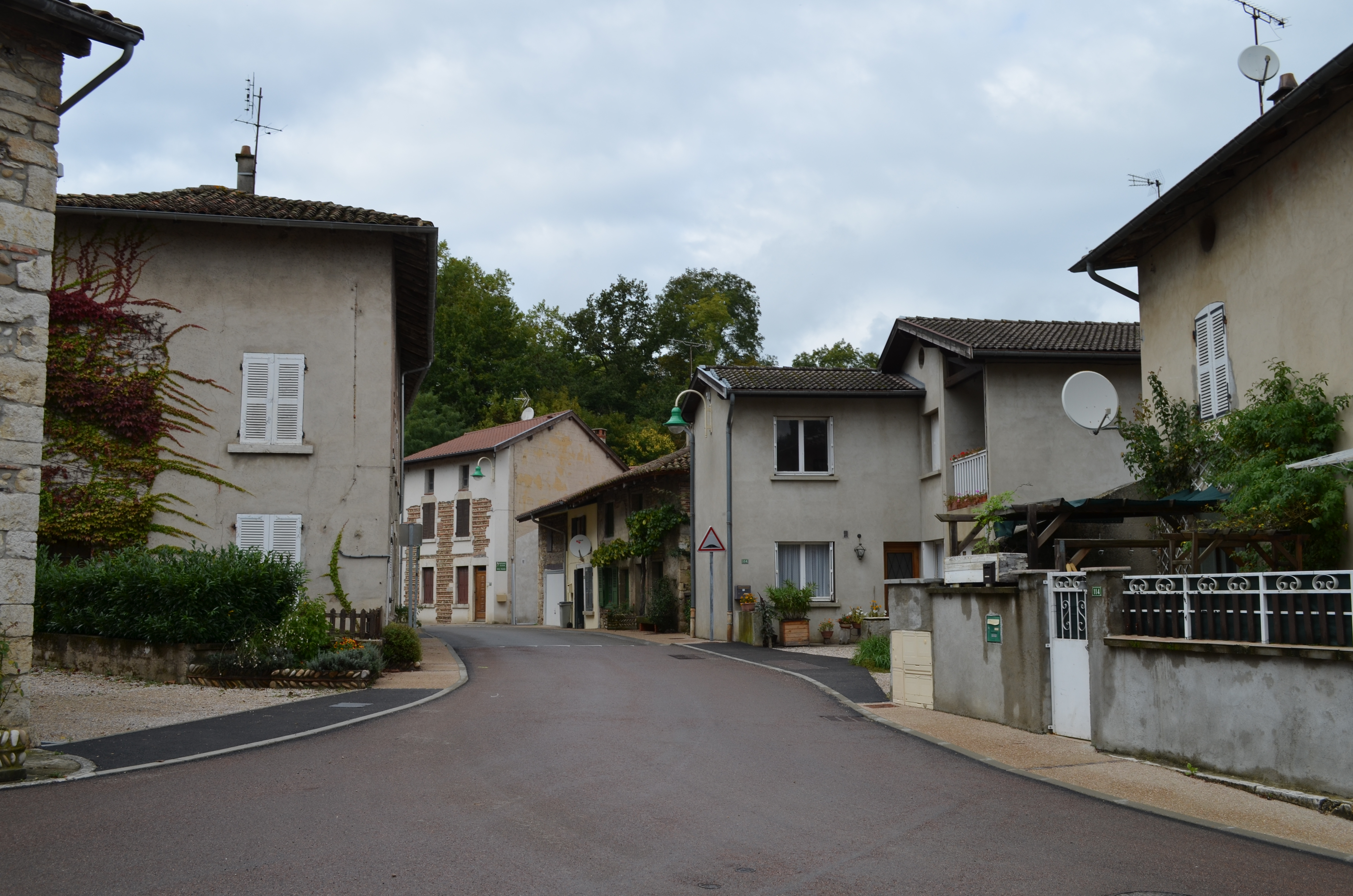 Une rue de Priay : Route de la Dombes.